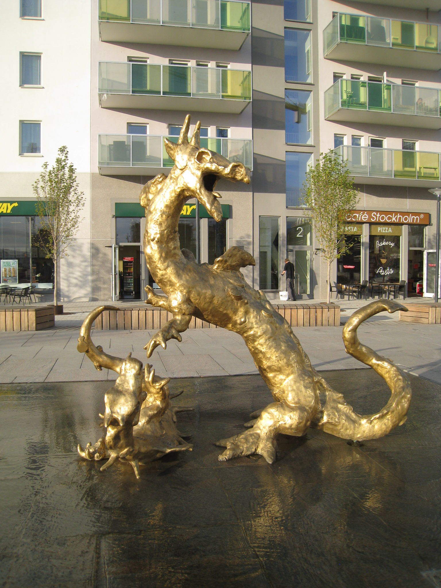 Skulpturgruppen Dogfight av skulptören Fredrik Wretman (född 1953) på Stora Torget i Barkarbystaden, Järfälla kommun, Stockholms län. Skulpturen invigdes 2015.